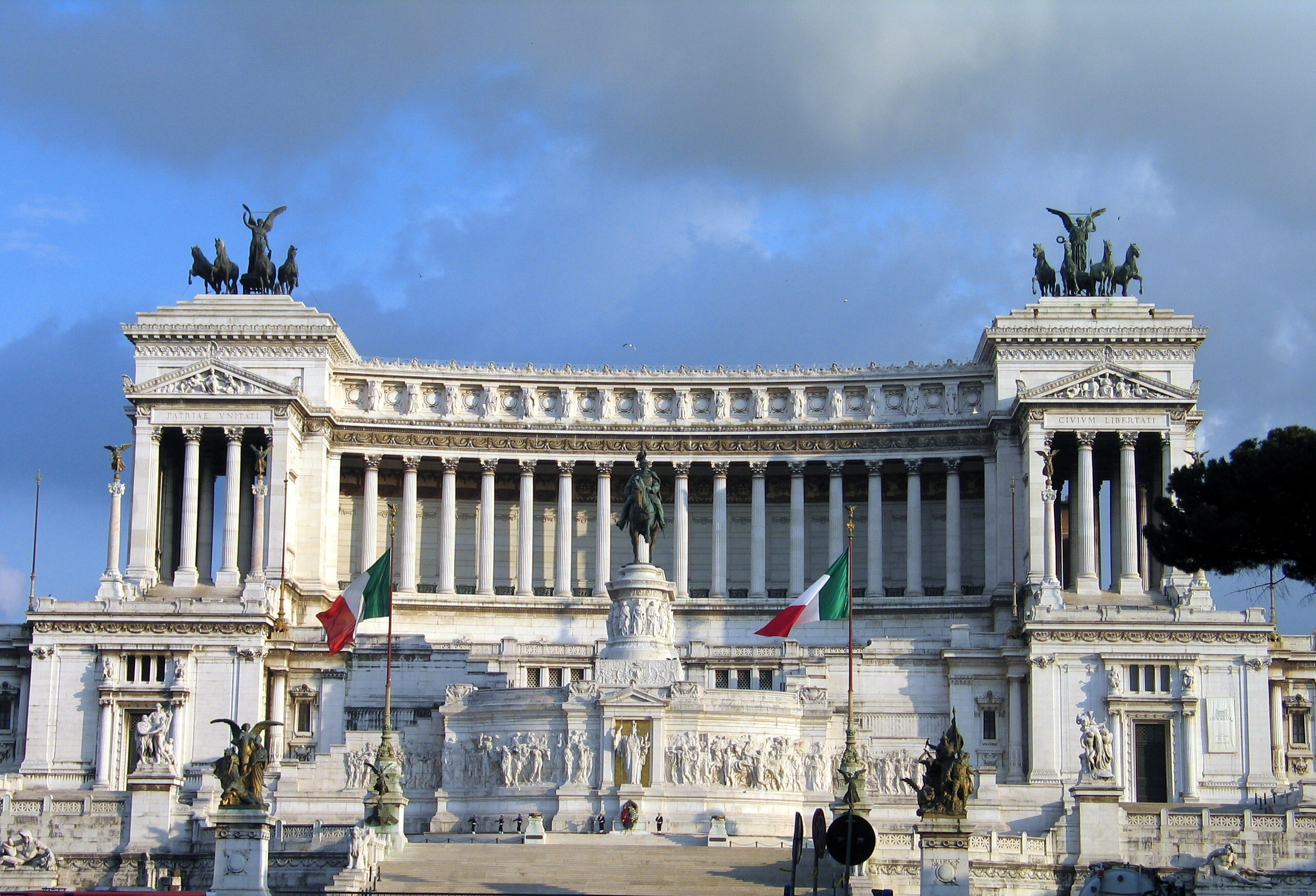 Vittorio Emmanuele II Monument